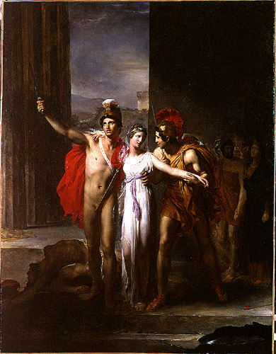 Léon Cogniet, Hélène délivrée par Castor et Pollux, 1817, Paris, Ecole Nationale Supérieure des Beaux-Arts